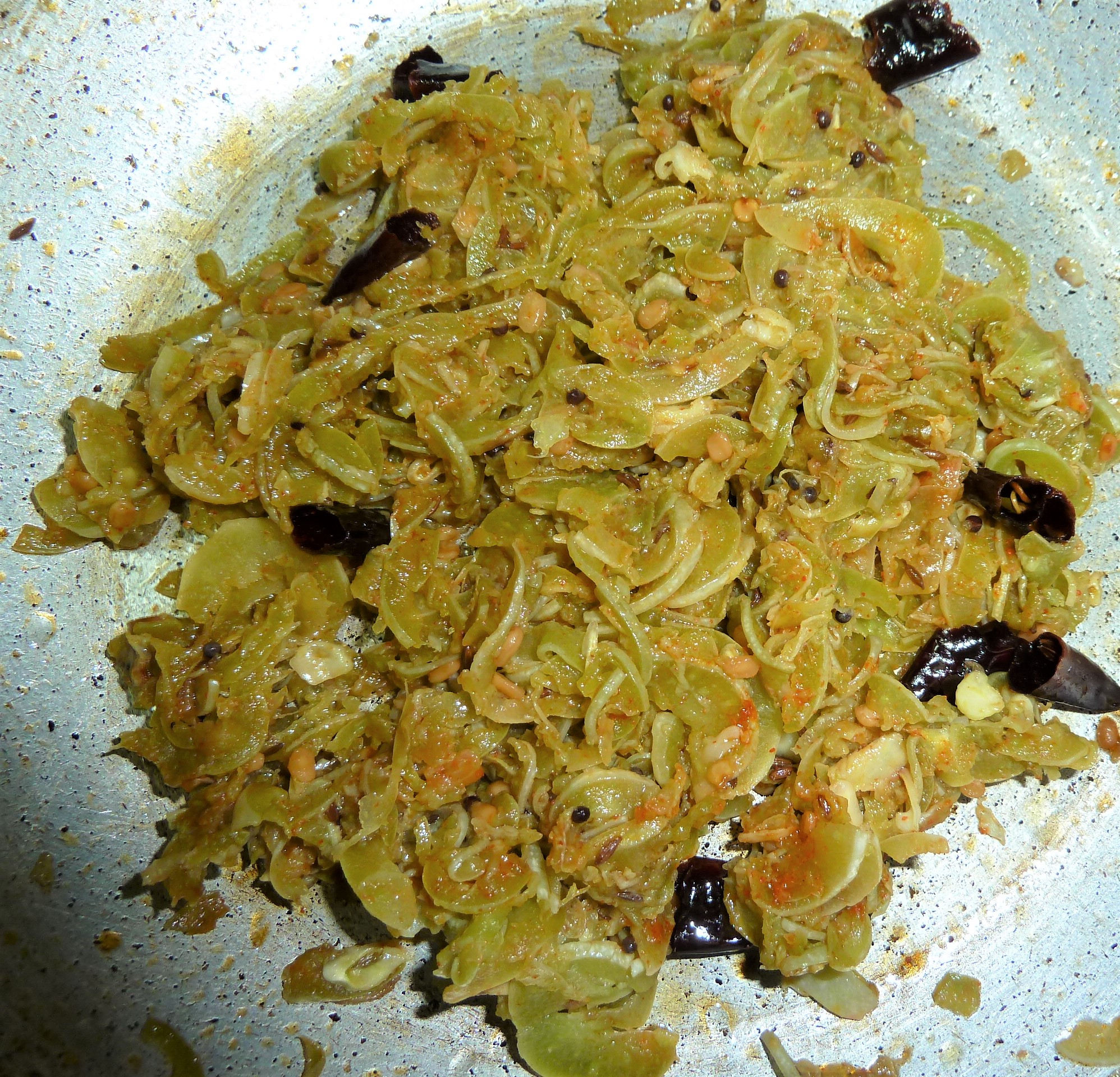 పొట్లకాయ పోపు కూర